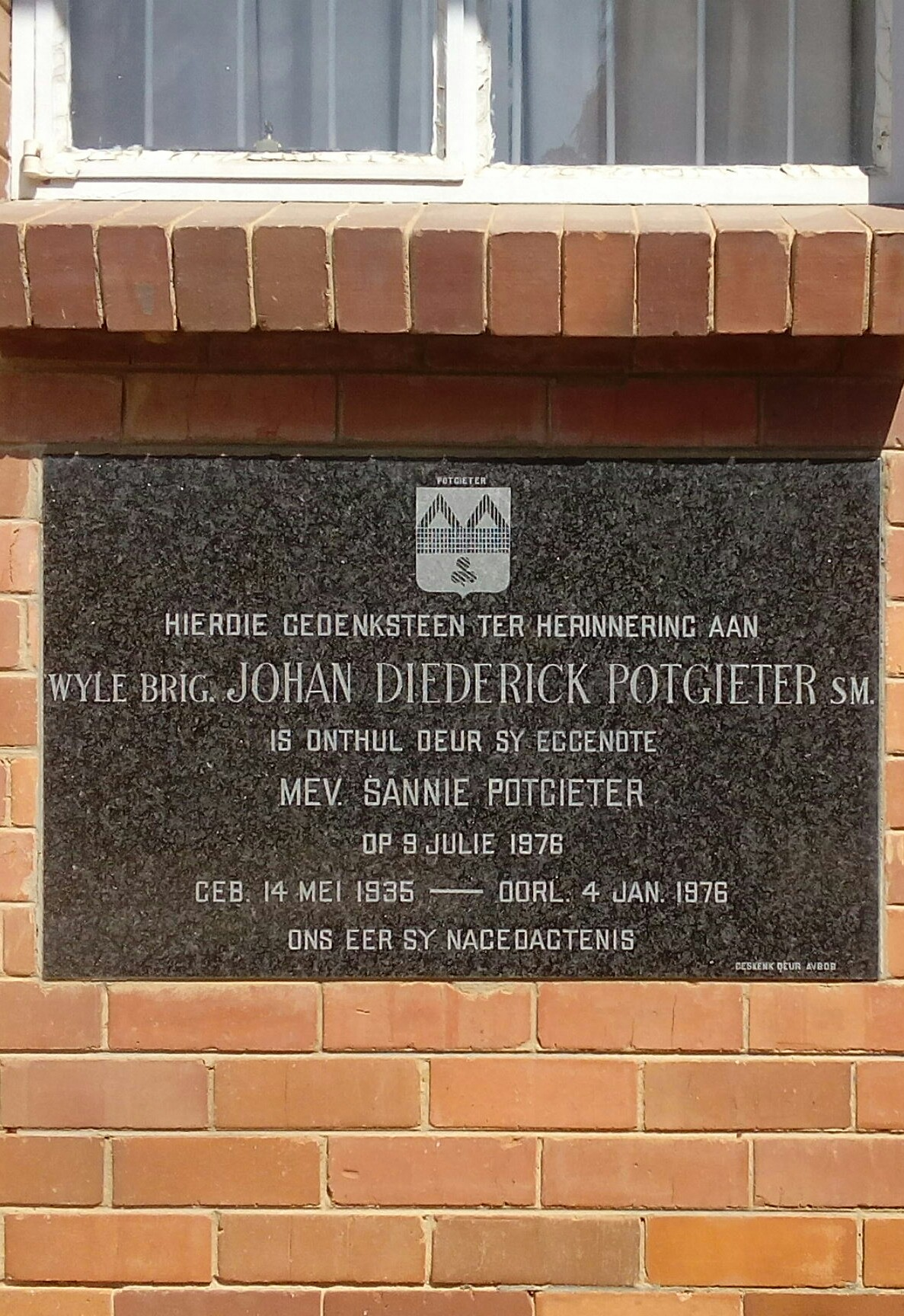 Brig Potgieter's gedenkteken unveiled by his wife in 1976